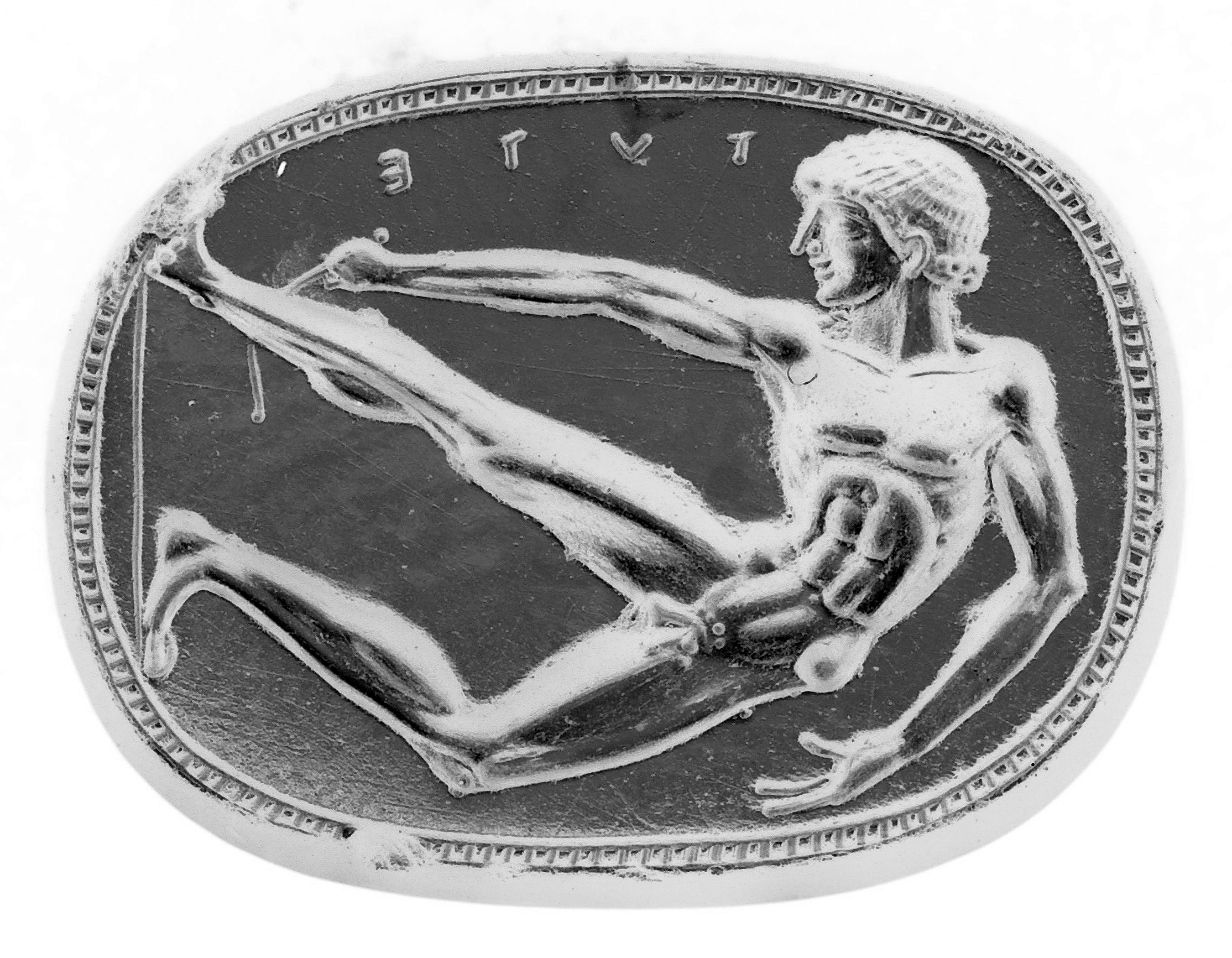 Etruskischer Skarabäus mit Tydeus Siegelseite: Tydeus mit Beischrift als Athlet mit Strigilis Standort: Antikensammlung, Staatliche Museen zu Berlin Material: Karneol Maße: Länge 1,4 cm; Breite 1,1 cm; Dicke 0,2